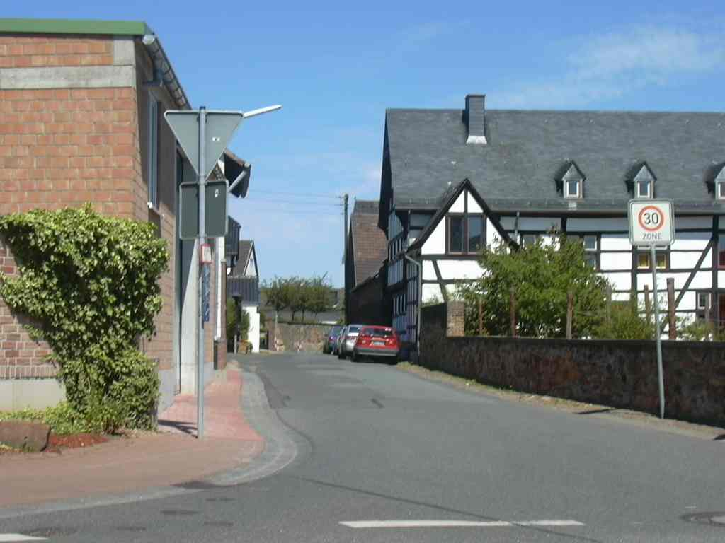 Enzen Ortskern